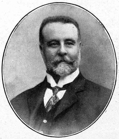 Excmo. Sr. Conde de Montornes, Comisario Regio de Fomento y entusiasta agricultor valenciano, propietario de la finca "la Vallesa de Mandor", de Kaulak.